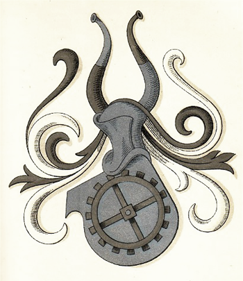 Våbenskjold for slægten Muus til Steenalt